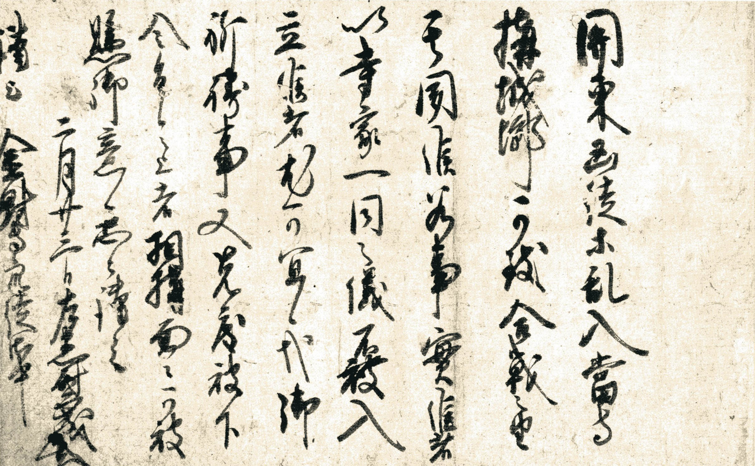 金剛寺文章